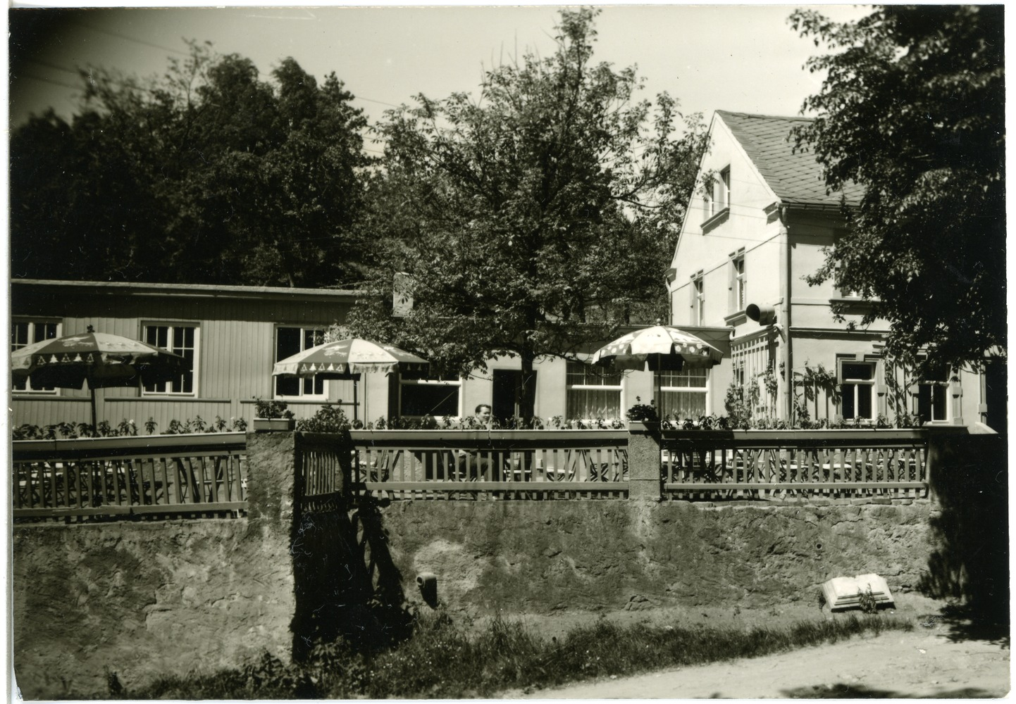 Golk; Talhaus Golk This postcard is from publisher Brück & Sohn in Meißen ( postcard has a unique number 29425 and is available in a higher resolution at the publisher. This images was uploaded in a cooperation project between Wikipedians and the publisher.